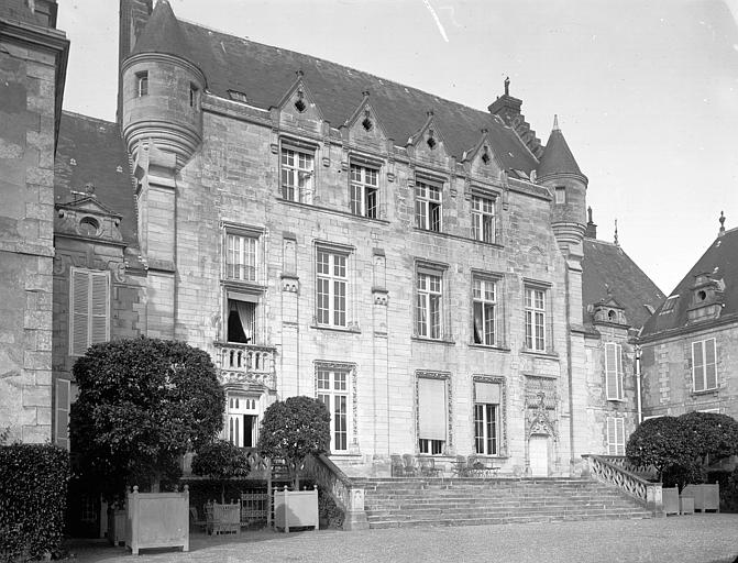 Château de Fresneaux-Montchevreuil